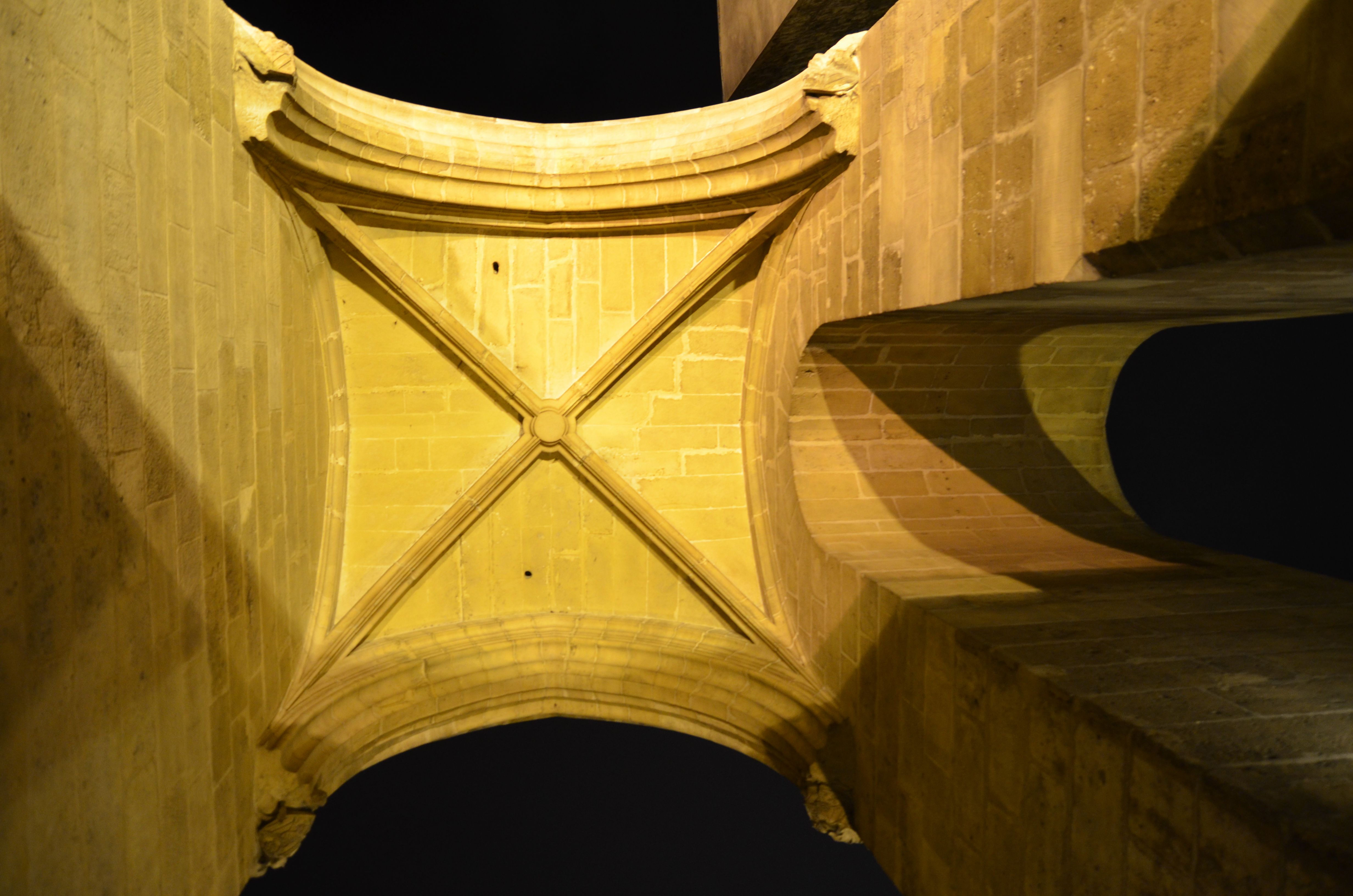 Sous l'arcade de la Tour Jean-sans-Peur, à Paris, de nuit.